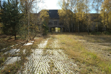 Versuchsstelle für Kraftfahrt, Neue Verskraft, Hauptgebäude in Kummersdorf-Gut